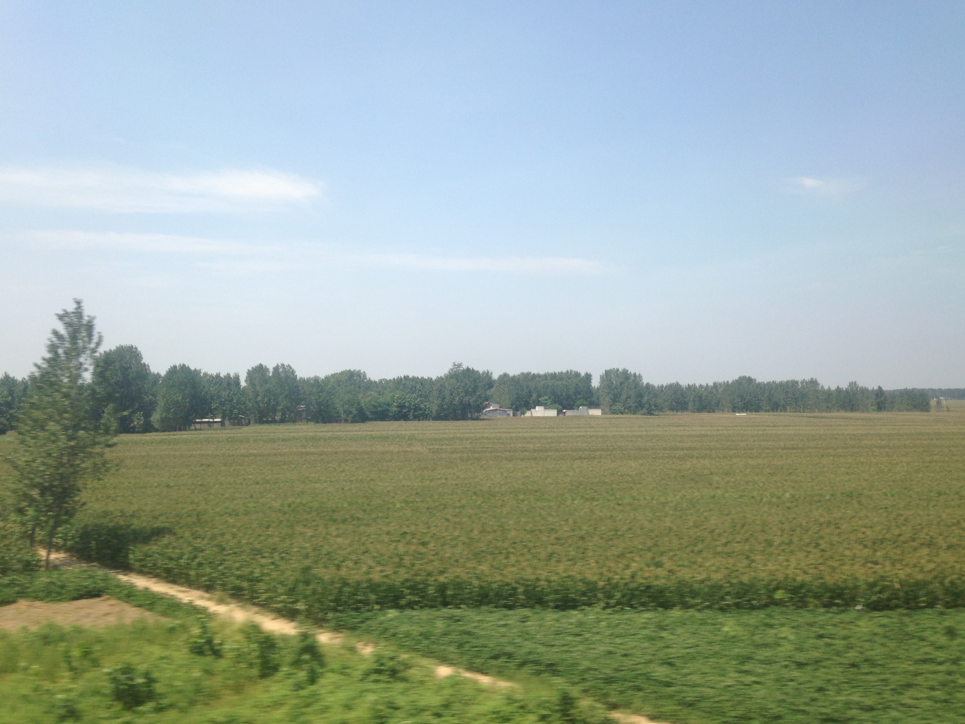 石武旅客専用線の列車内より望む駐馬店市西平県蔡寨回族郷付近の景色